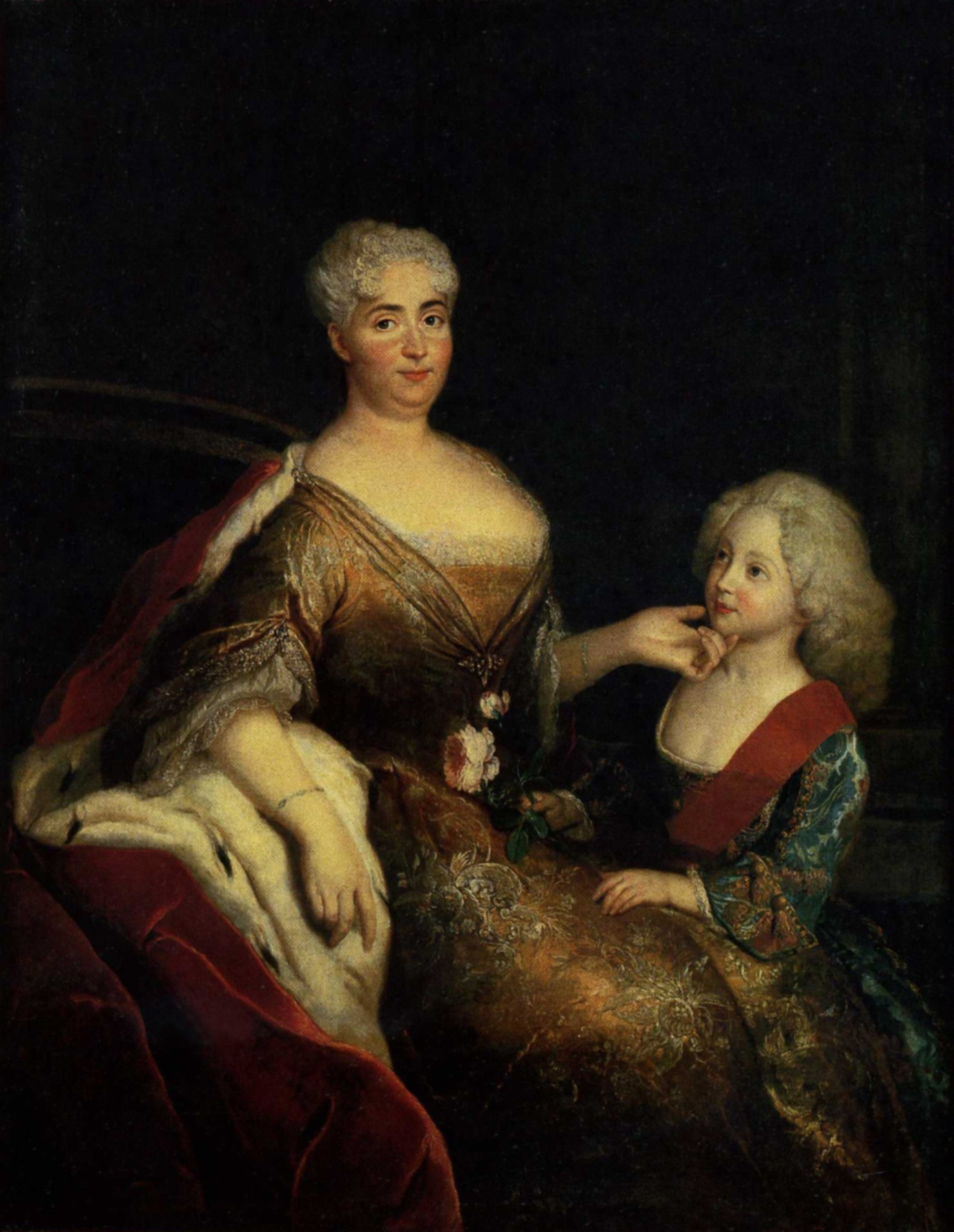 Markgräfin Maria Dorothea von Brandenburg-Schwedt mit Sohn Friedrich Wilhelm.title QS:P1476,de:"Markgräfin Maria Dorothea von Brandenburg-Schwedt mit Sohn Friedrich Wilhelm." label QS:Lde,"Markgräfin Maria Dorothea von Brandenburg-Schwedt mit Sohn Friedrich Wilhelm."